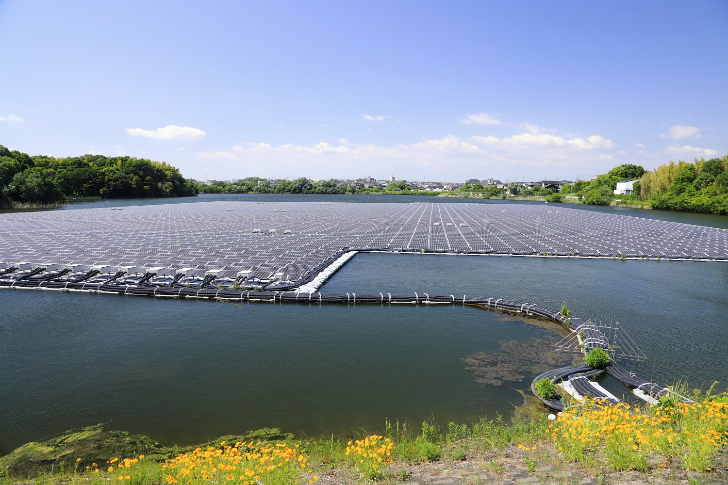 若王子池（豊明市沓掛町、2018年（平成30年）5月）